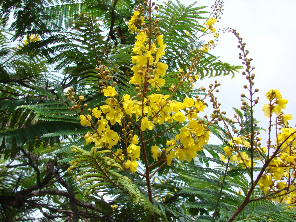 flowers of peltophorum dubium - FABACEAE Parque da Cidade - Brasília - Distrito Federal - Brasil.